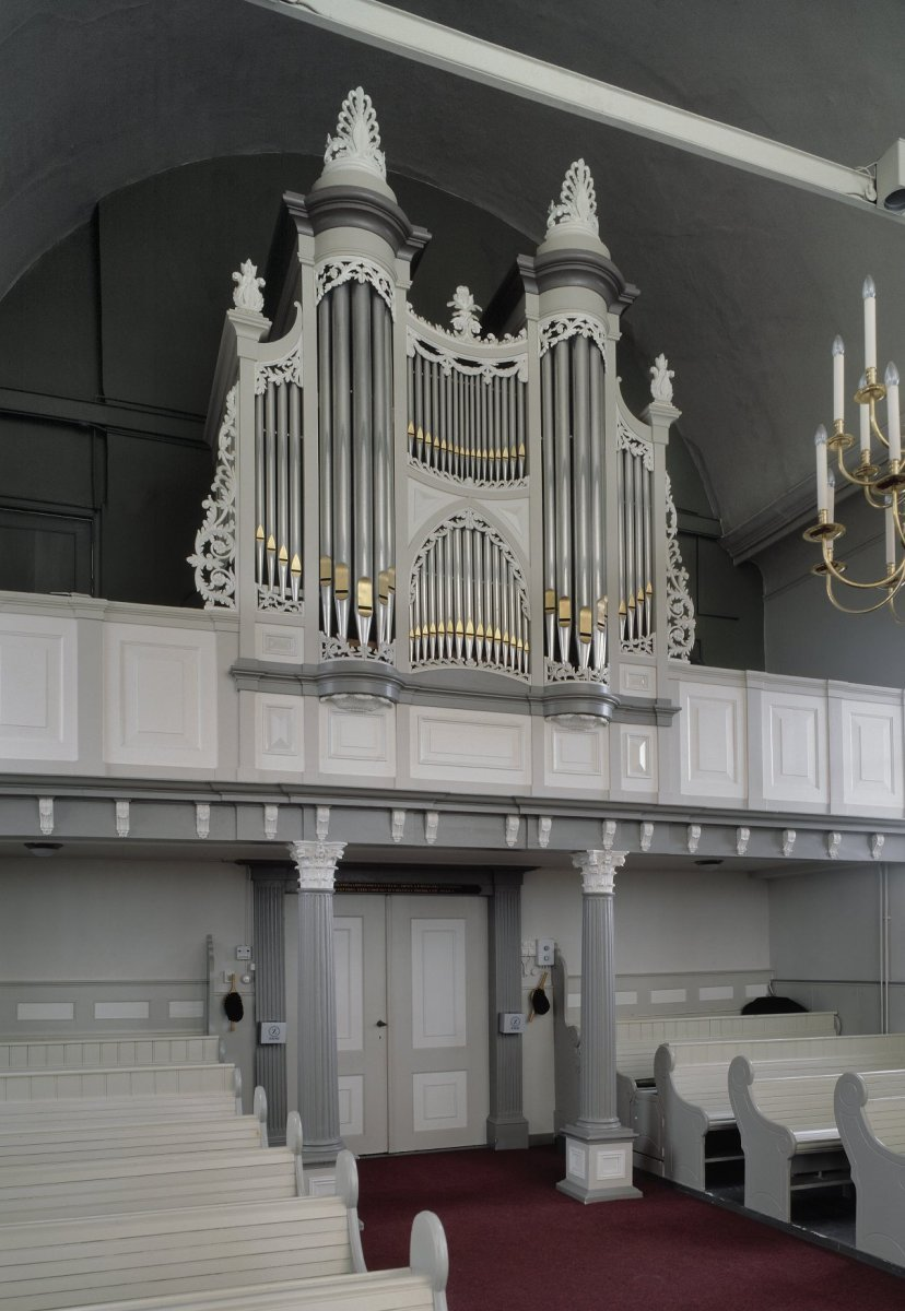 Nederlands Hervormde Kerk: Interieur, aanzicht orgel, orgelnummer 695 (opmerking: Gefotografeerd voor Het Historische Orgel in Nederland 1850-1858)